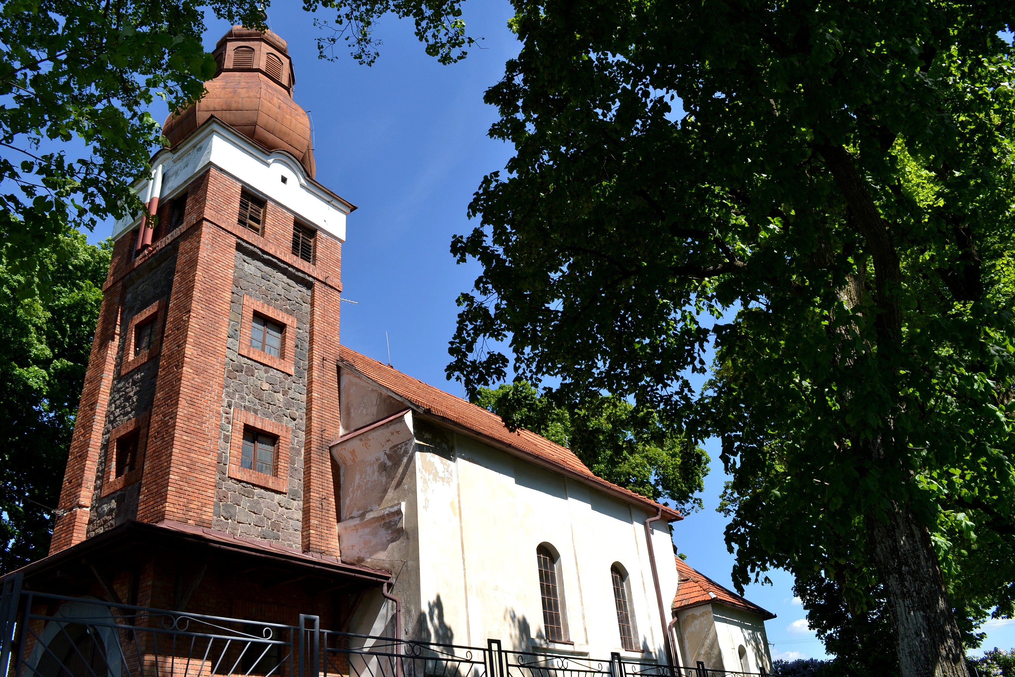 Evanjelický kostol v obci Žibritov (okr. Krupina). Kostol pochádza z r. 1876